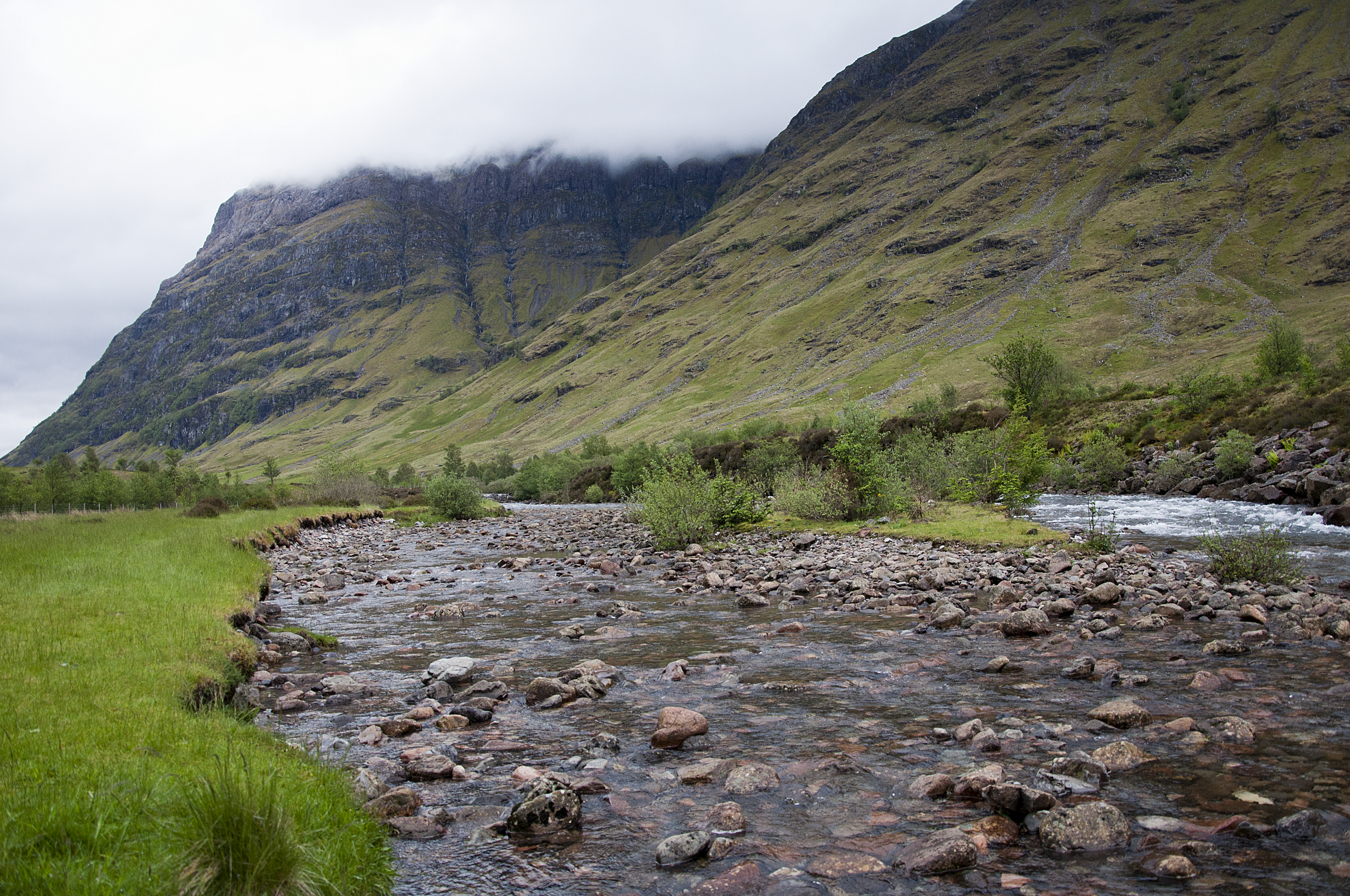 Rivier Coe in de vallei Glen Coe, Schotland met rechts Meall Mòr en Aonach Dubh